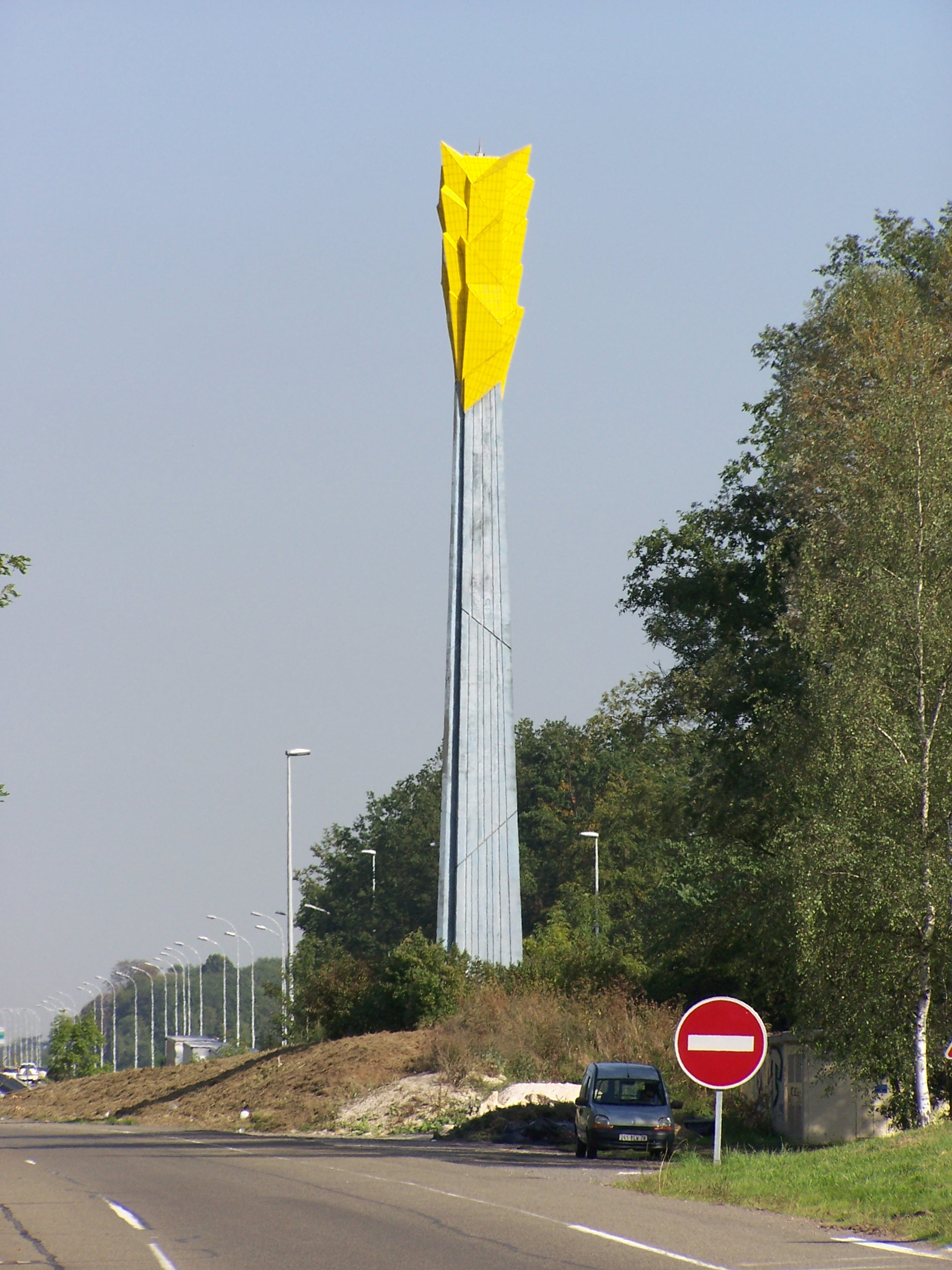 Colonne de l'Épi d'Or à Saint-Cyr-l'École (Yvelines, France). Photo personnelle Alain Terseur, Sculpteur Column of l'Épi d'Or (the golden ear) in Saint-Cyr-l'École (Yvelines, France). Personal picture. Auteur/Author : ℍenry Salomé